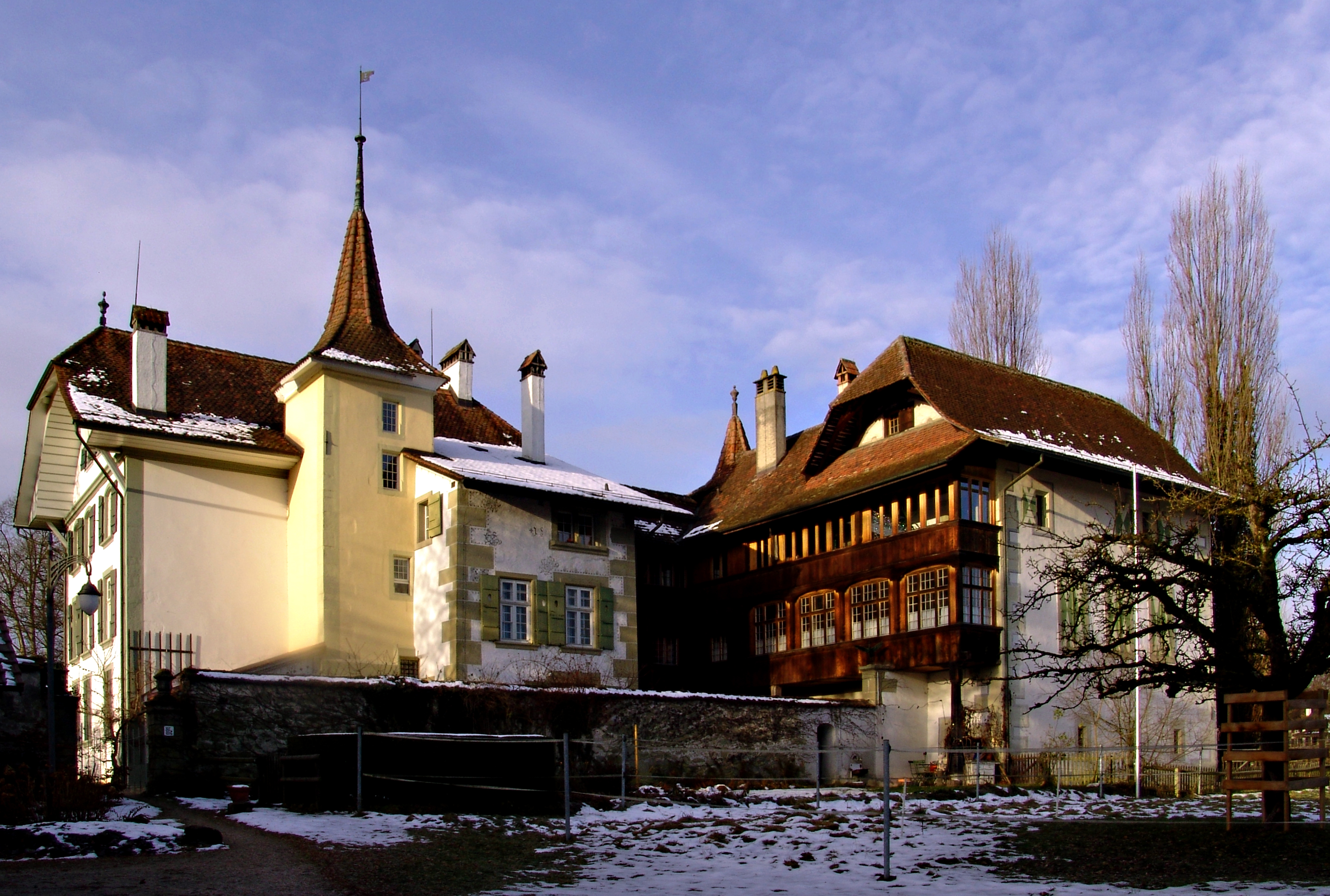 Schloss Wittikofen Bern